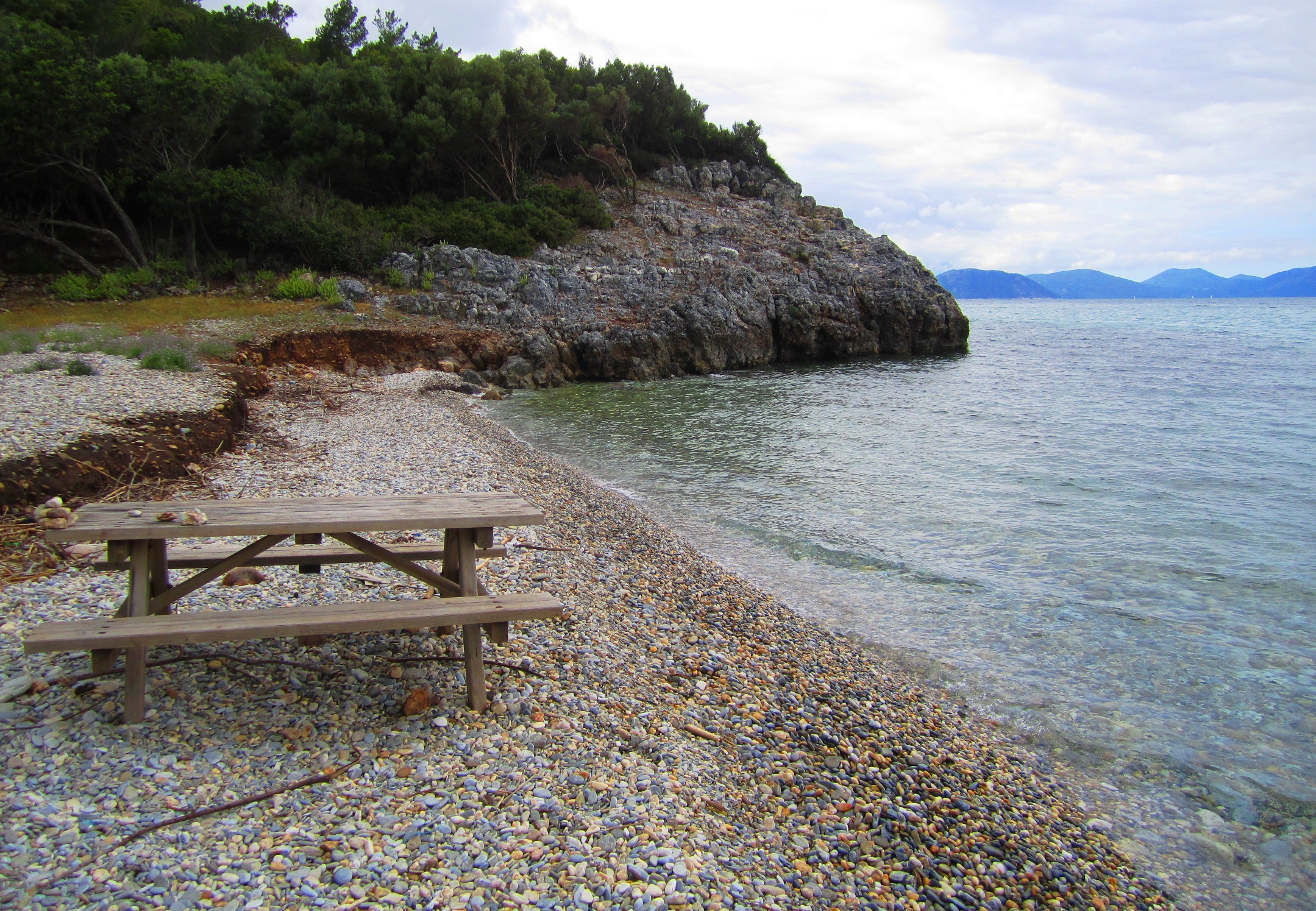 Kieselstrand im Dilek Nationalpark